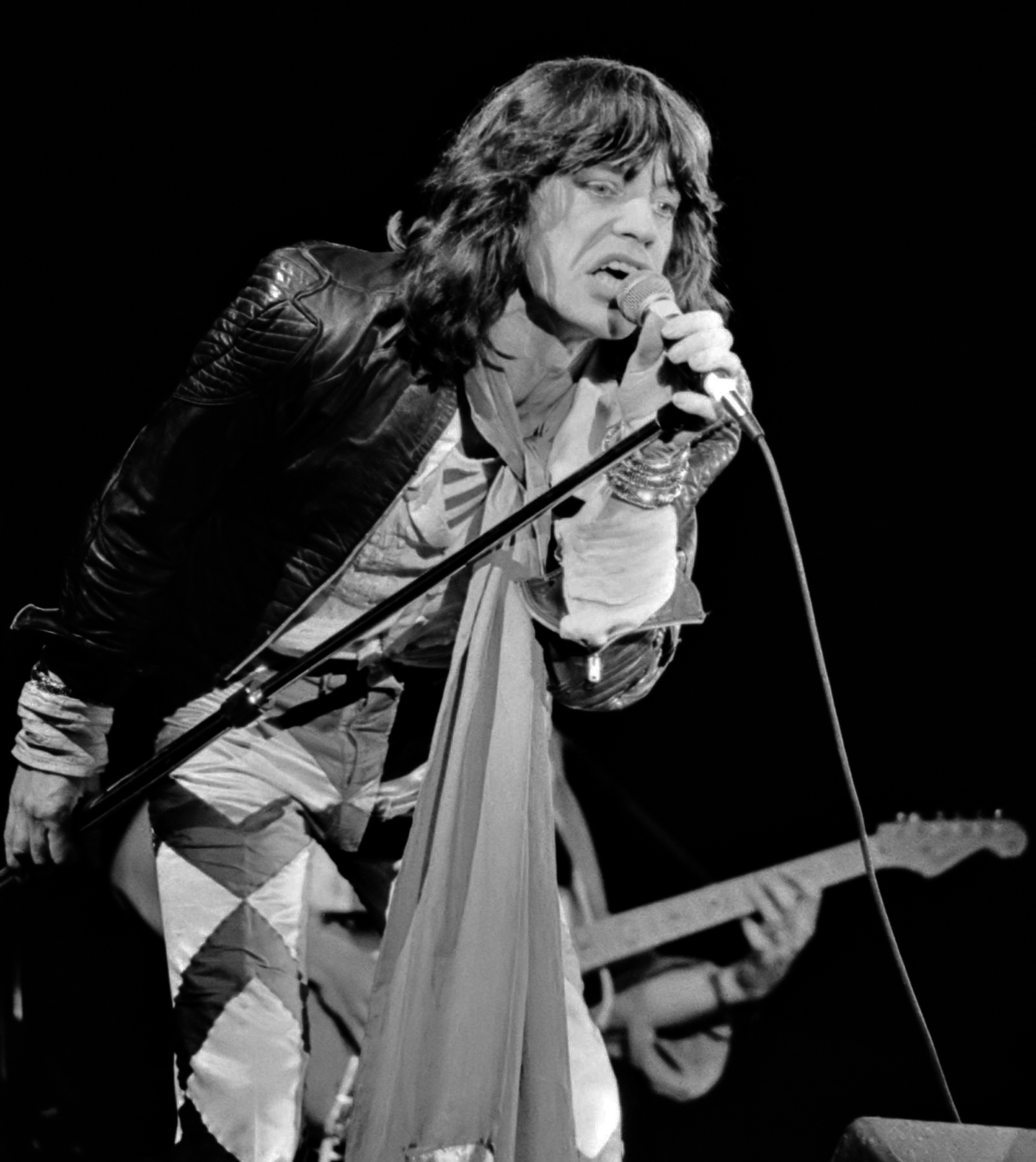 Rolling Stones concert in Zuiderpark te Den Haag, Mick Jagger in aktie 29 mei 1976